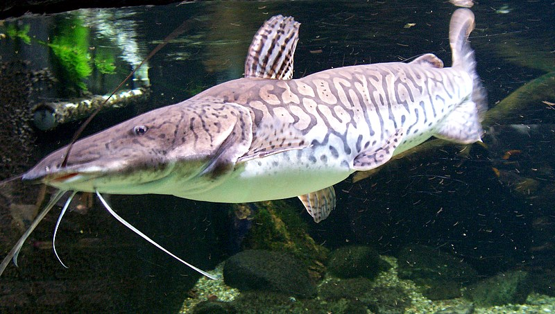 Pseudoplatystoma tigrinum